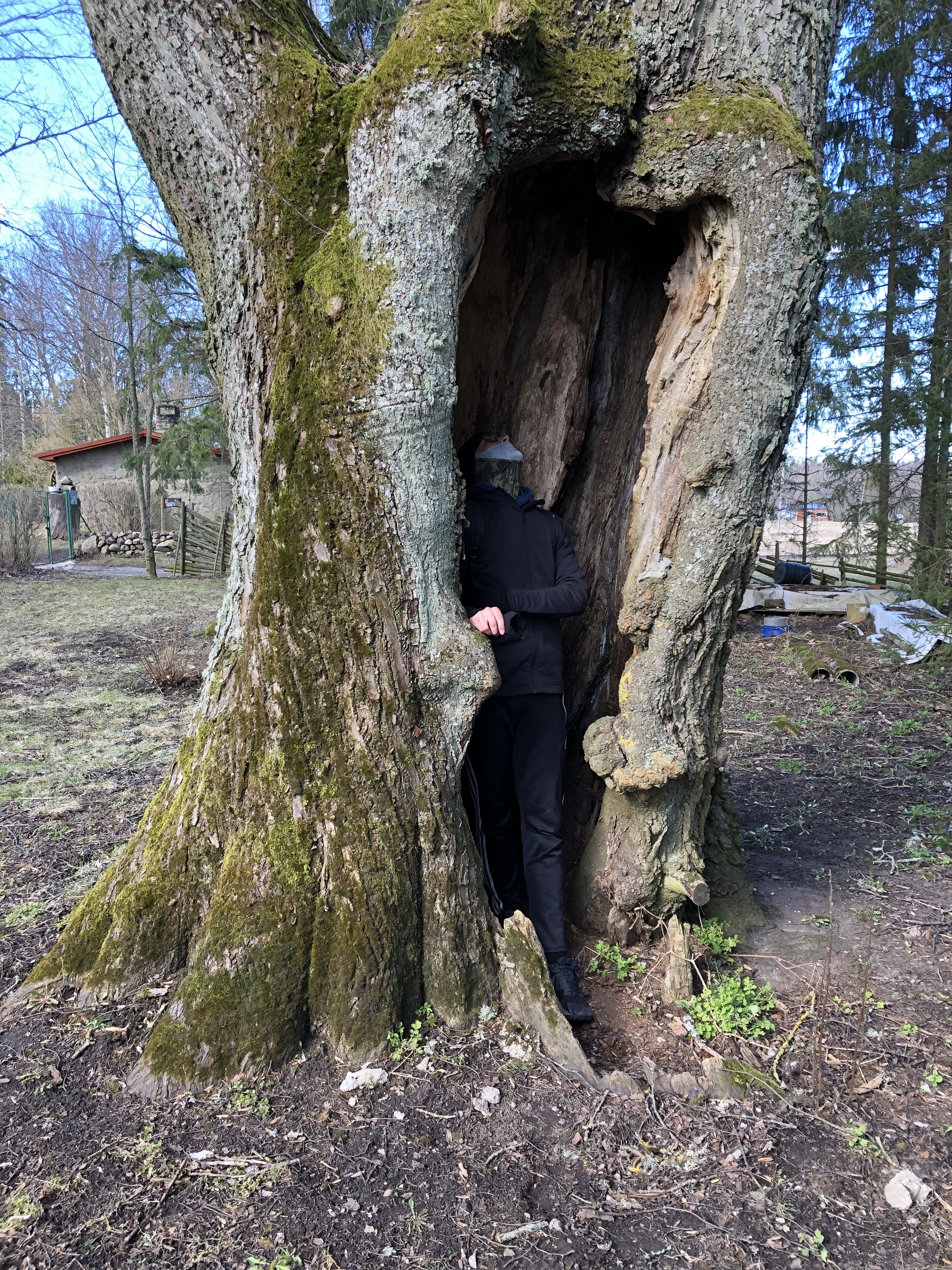 puuõõn